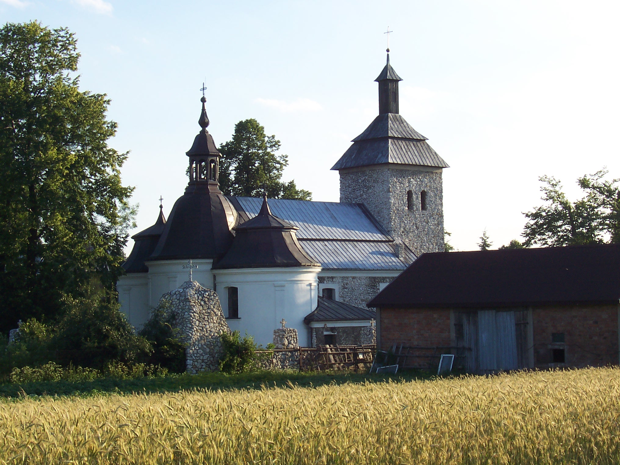 Kościół p.w. Trójcy Przenajświętszej i św. Floriana w Zawierciu-Skarżycach